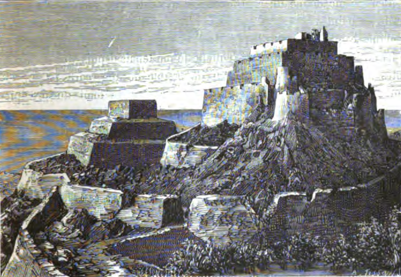 Vista de Fortaleza Paramonga